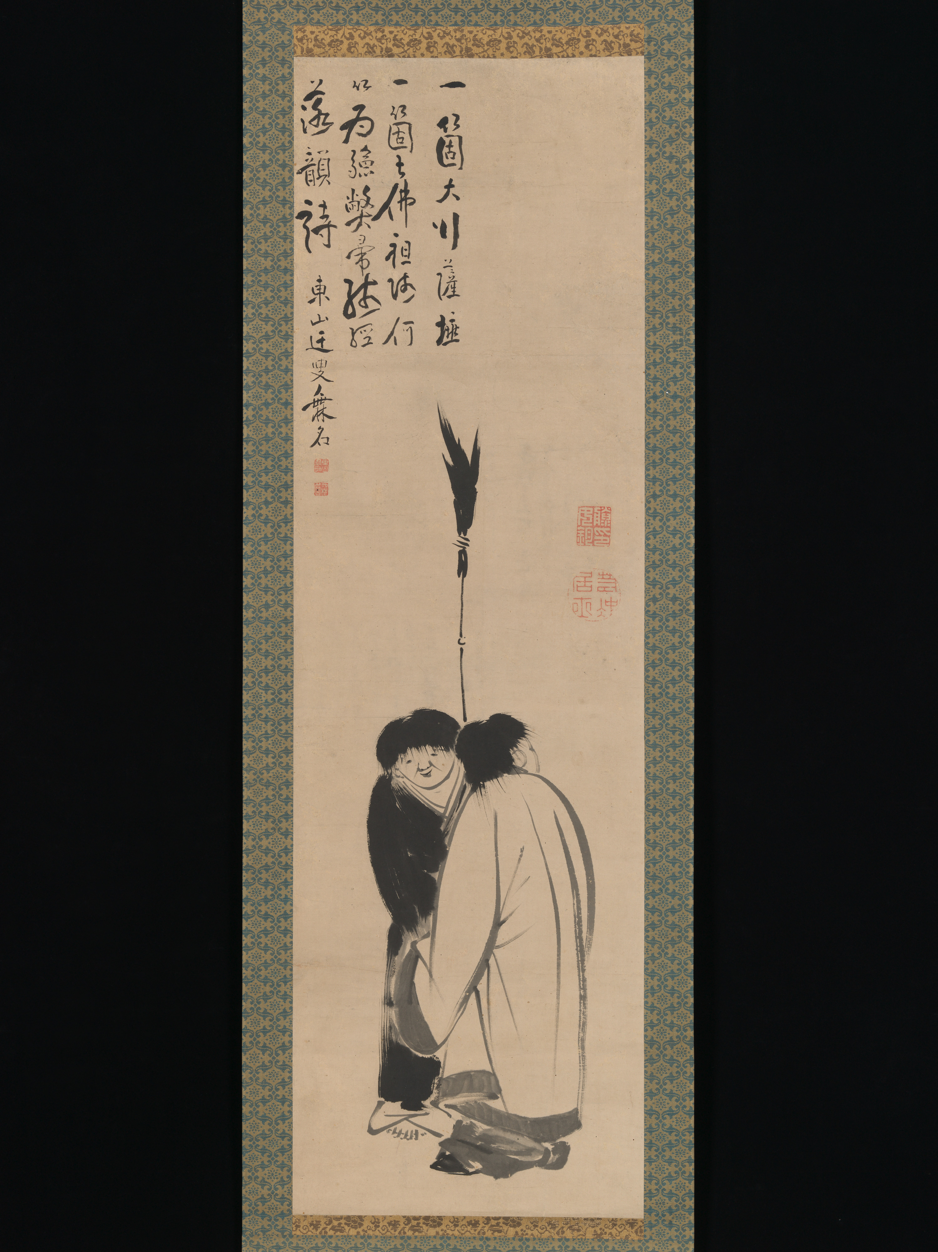 Japan; Hanging scroll; Paintings